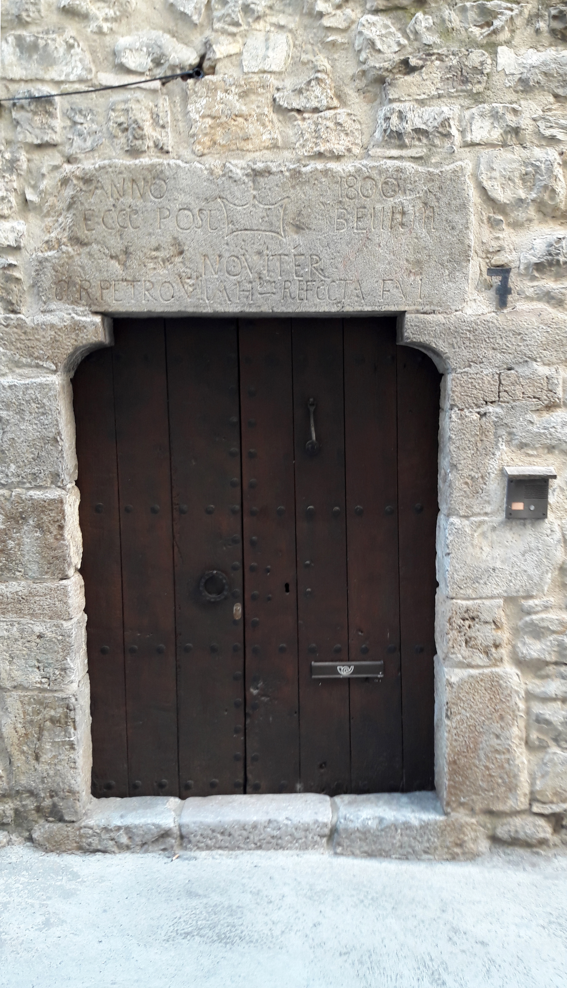 Detall de la llinda de la porta de la Rectoria (Terrades)